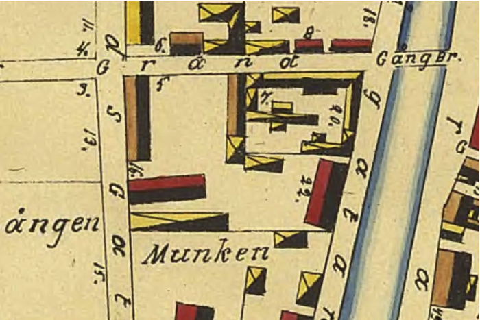 Stadskarta över kvarteret Munken, Uppsala (1882)